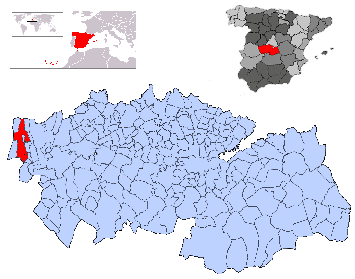 Calzada de Oropesa en la provincia de Toledo